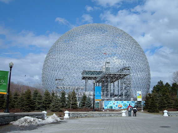 Terre des Hommes, Île Sainte-Hélène, Montréal, Québec, Canada